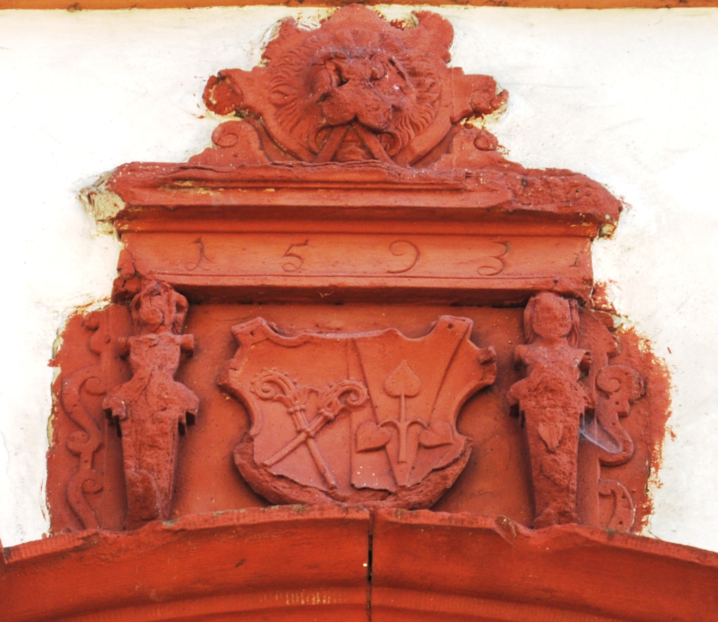 Wappen Johannes IV. Burckhardt, Amtshof, Prichsenstadt-Stadelschwarzach